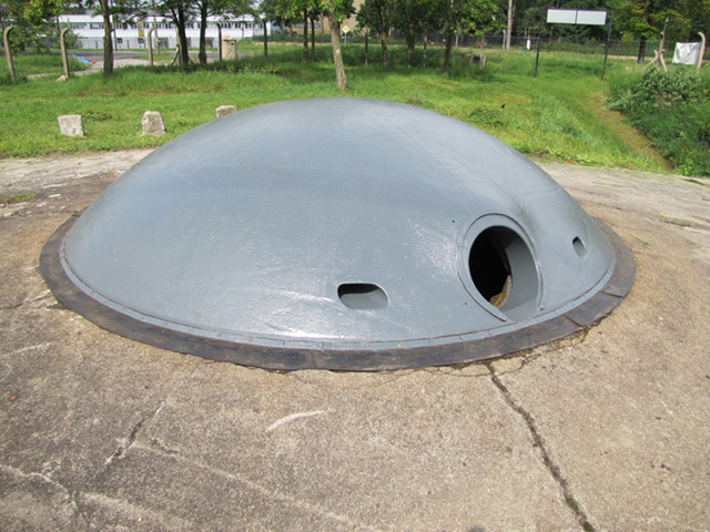 Wieża A.B. IV 1896 r. 105mm